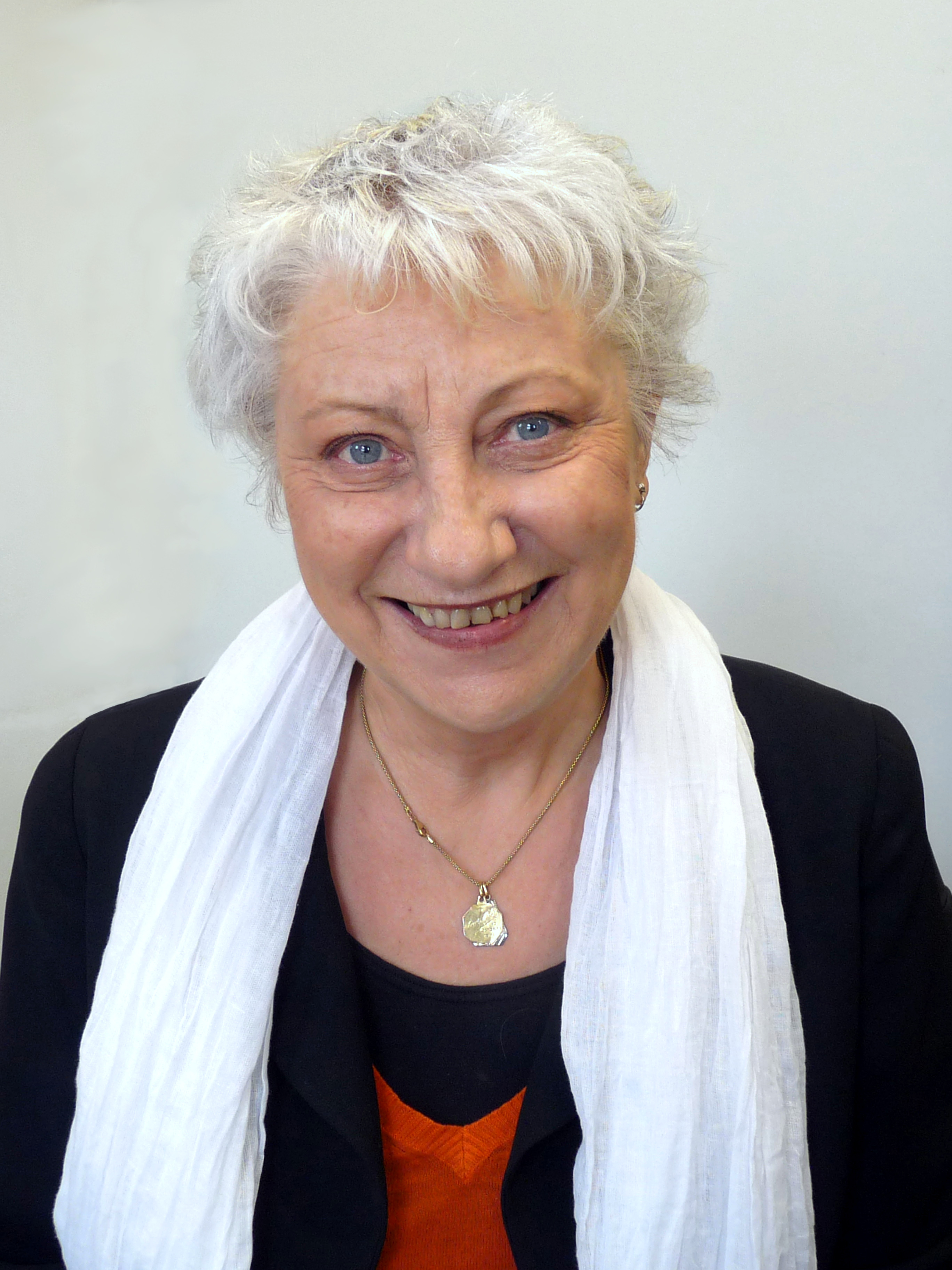 Anne-Marie Garat au Salon du Livre Amerigo Vespucci du Festival international de géographie de Saint-Dié-des-Vosges.